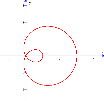 Owal Kartezjusza o parametrach: a = 1, b = 1, c = 0